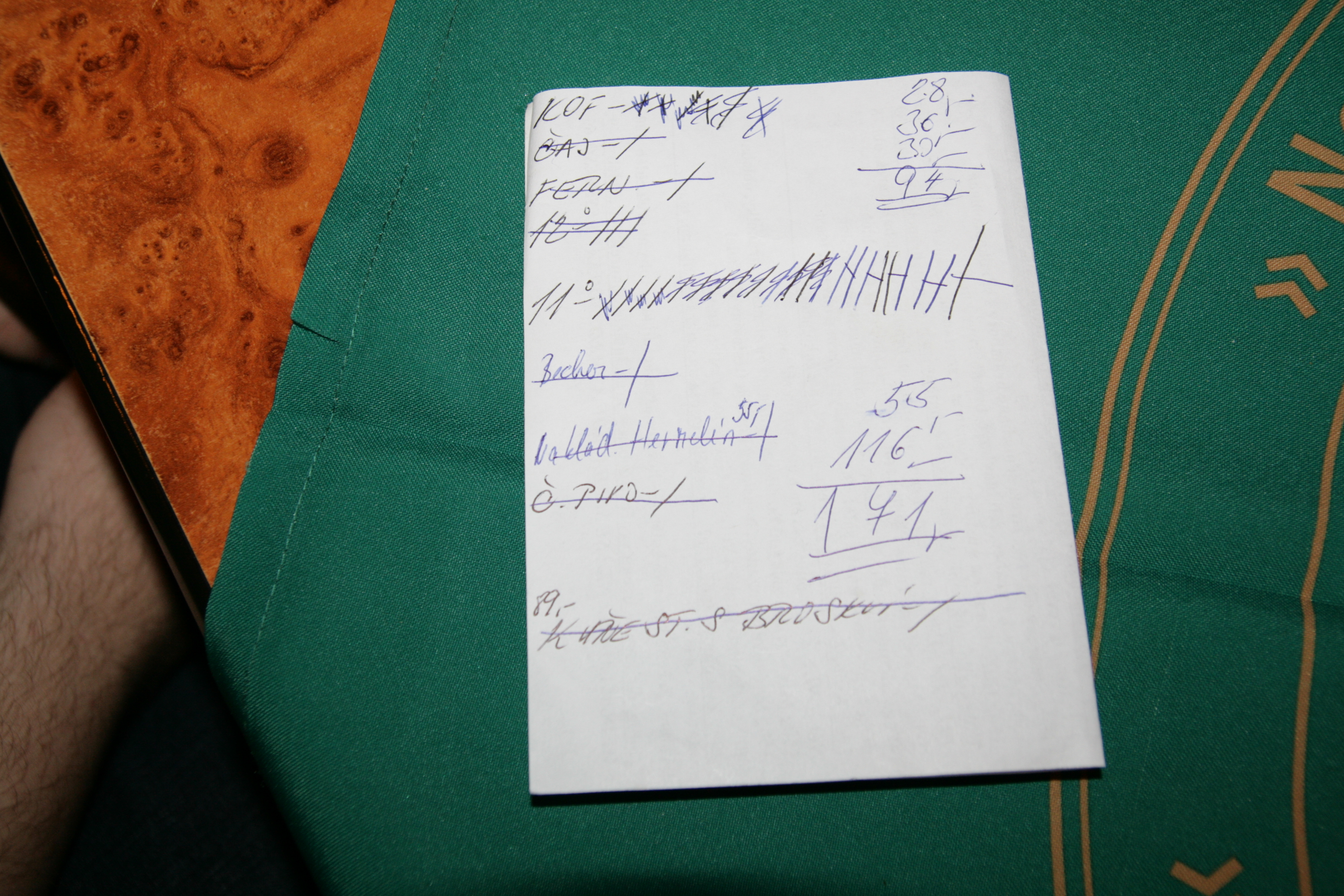 Účtenka z restaurace Pod Špilberkem po ukončení brněnského Wikisrazu v úterý 15. ledna 2013.